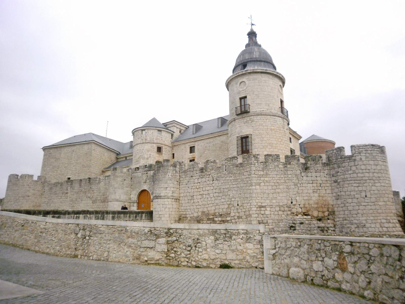 Simancas - Castillo y Archivo General